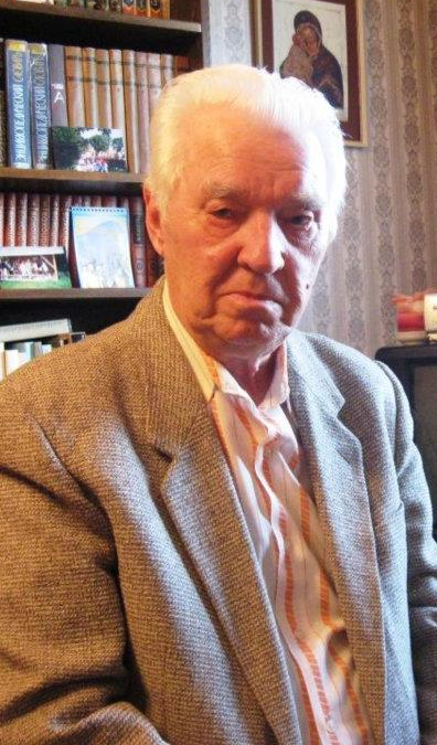 г.Тарту, Эстония